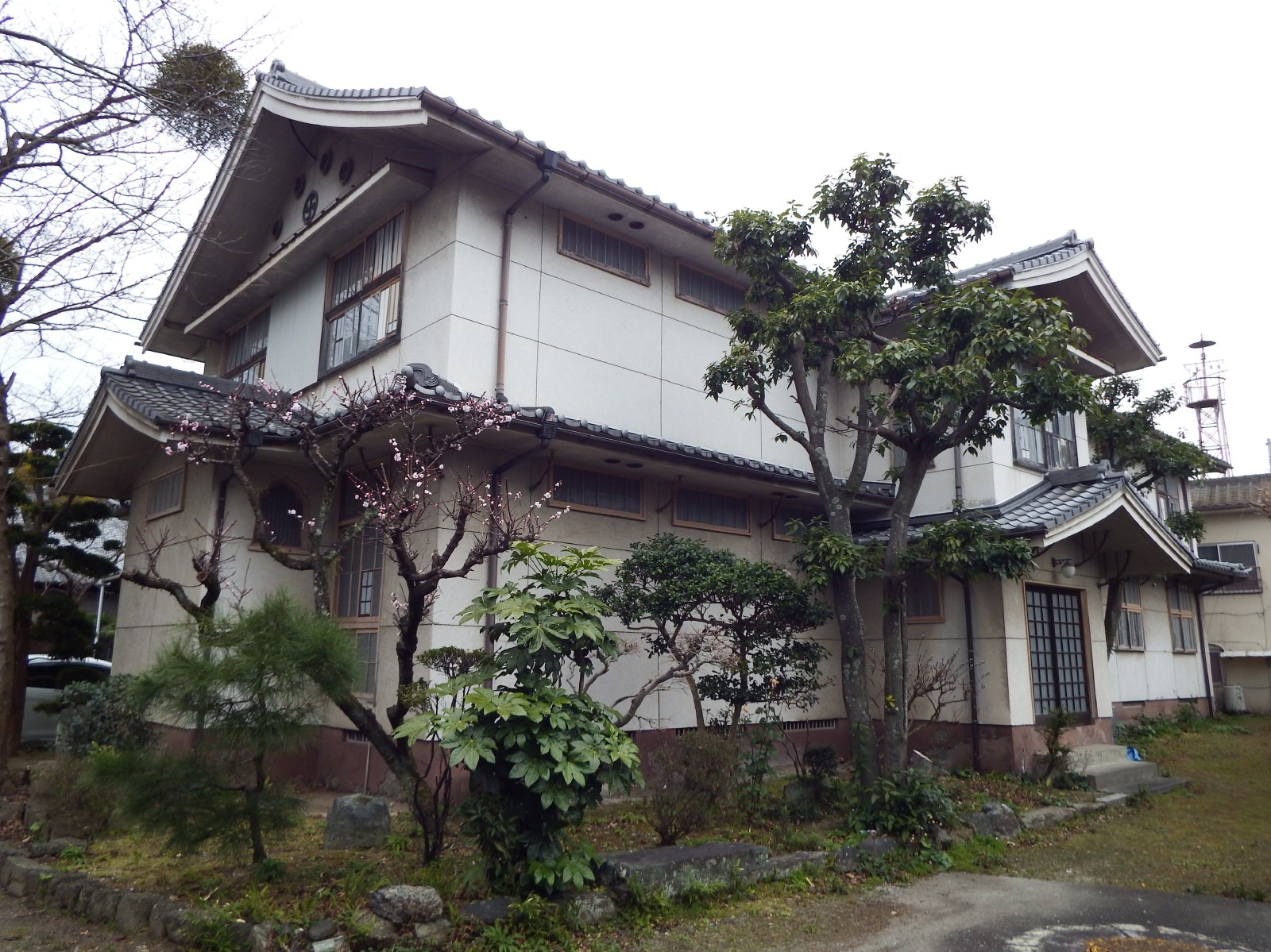 吉蔵寺の宿坊